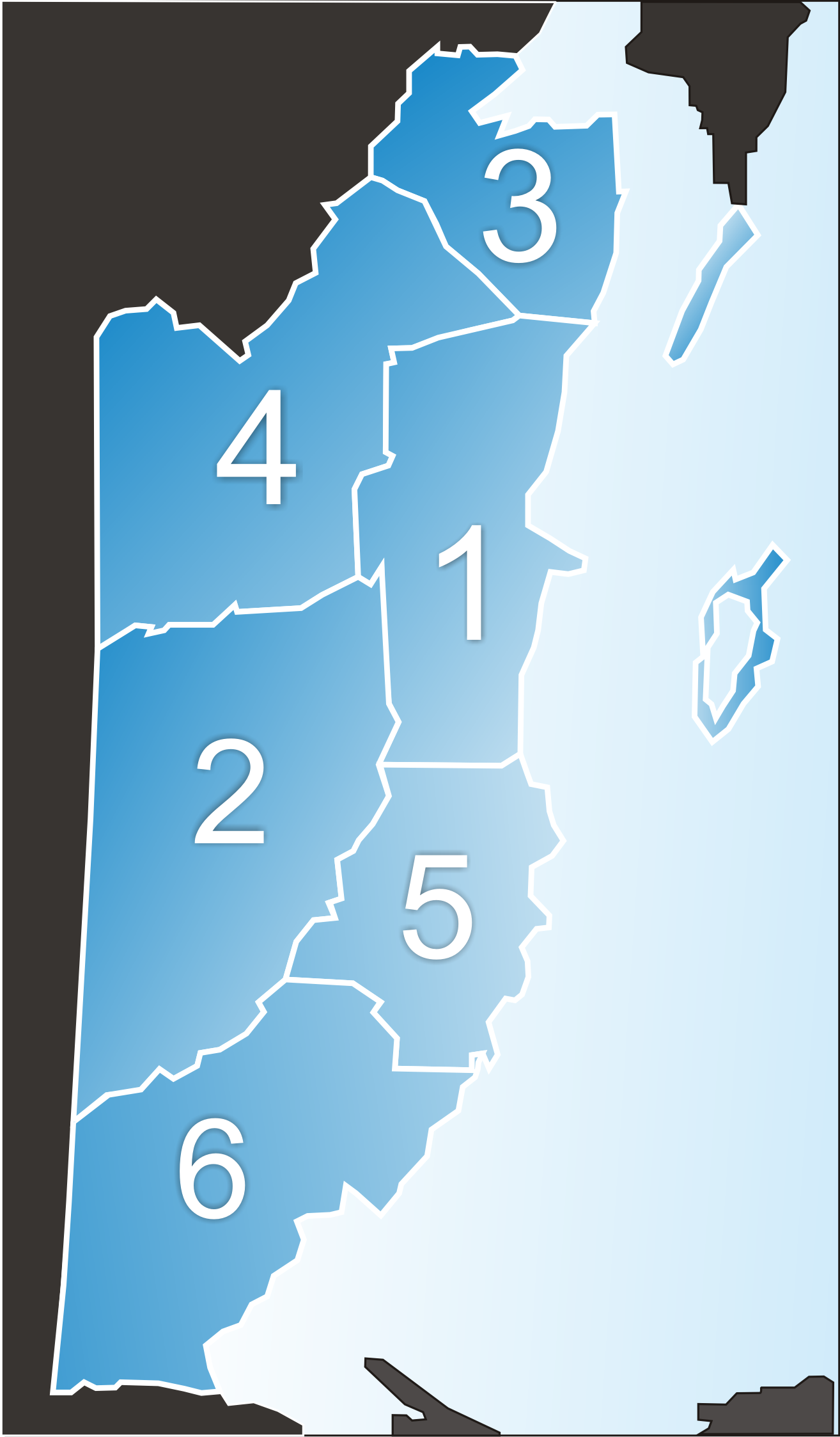 Imagen vectorizada de las provincias de belice en formato png.